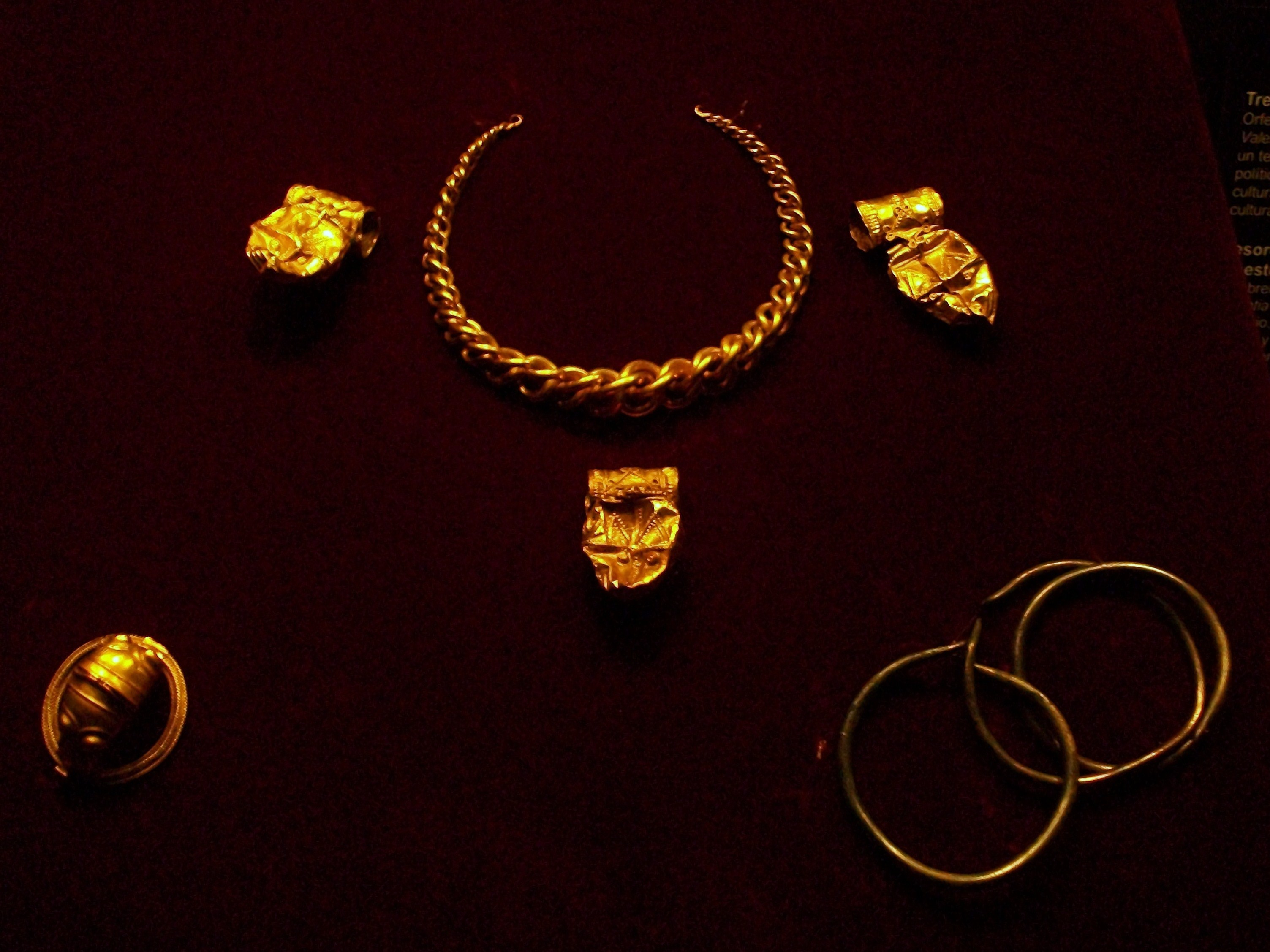 Tresor ibèric de Xest, s. II aC, Museu d'Història de València.